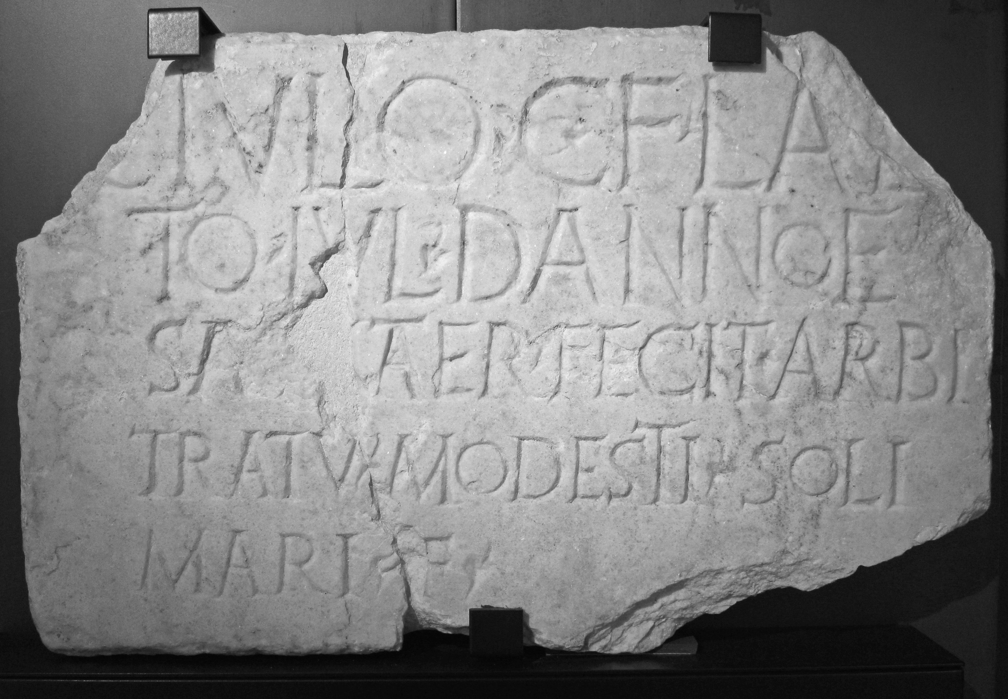 Saint-Lizier (Ariège, France) : Plaque de marbre portant une épitaphe, d'époque romaine, découverte dans le rempart de l'oppidum lors de son percement en 1973. Musée départemental de l'Ariège, Inv. 2009.2.1.1. AE 1974, 424 = AE 1996, 1044: Iulio C(ai) f(ilio) Lae/to Iul(ia) Dannoe/sa mater fecit arbi/tratu Modesti / Soli/mari f(ilii?)